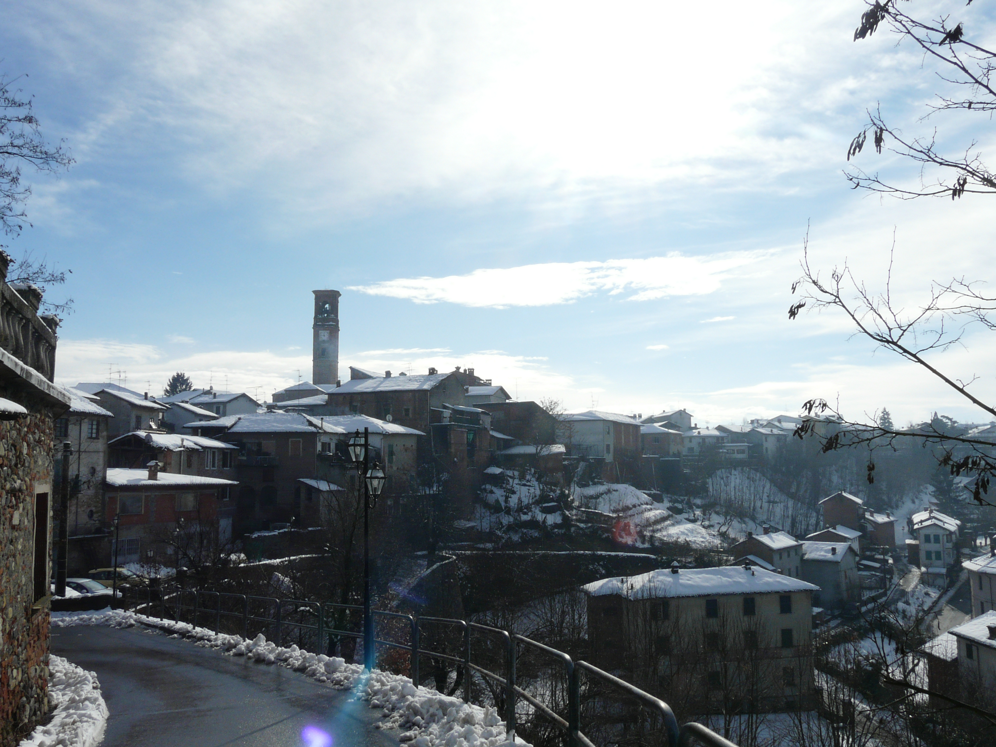 Panorama di Capriata d'Orba, Piemonte, Italy